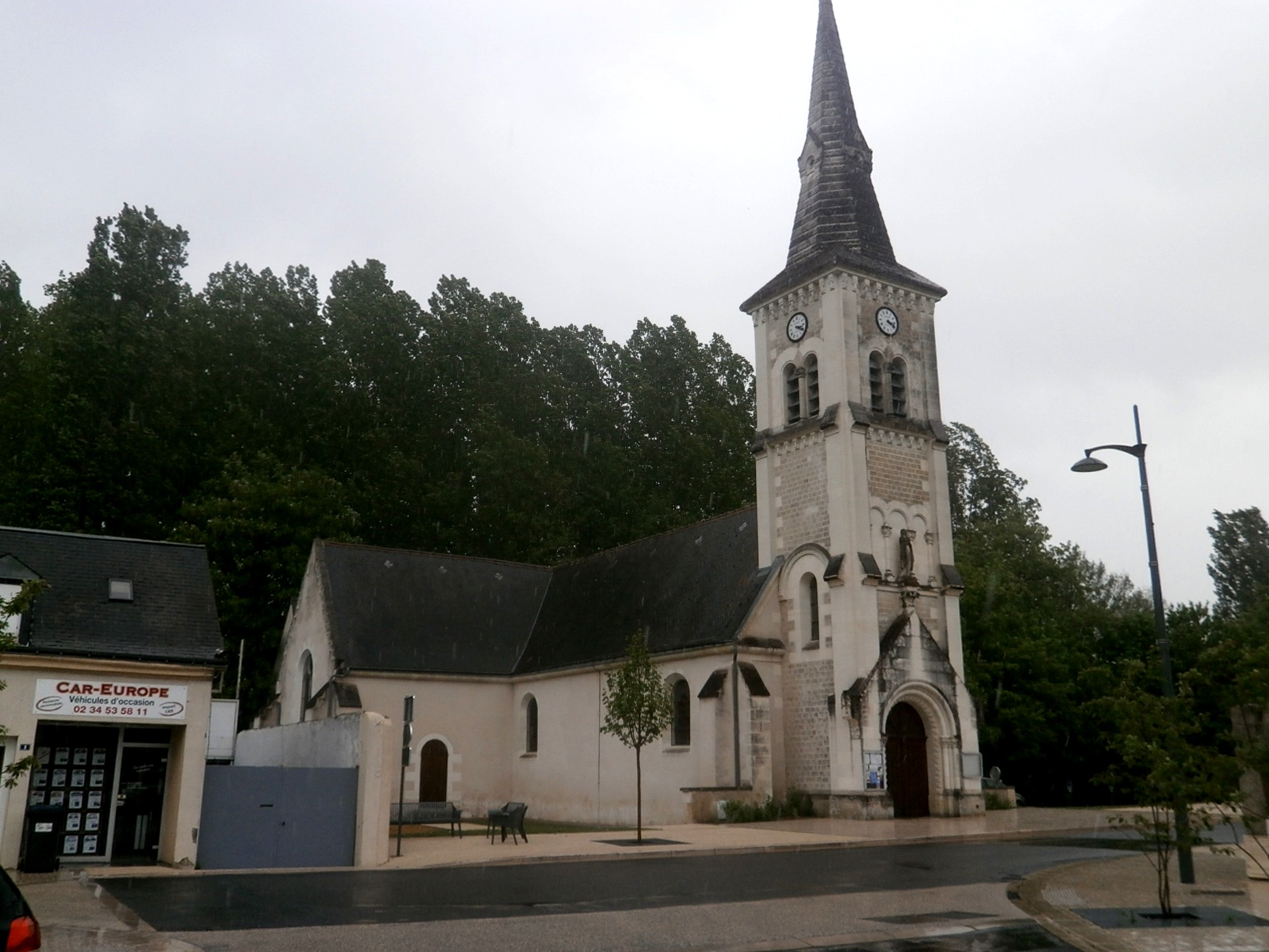 L'église de La Membrolle-sur-Choisille.